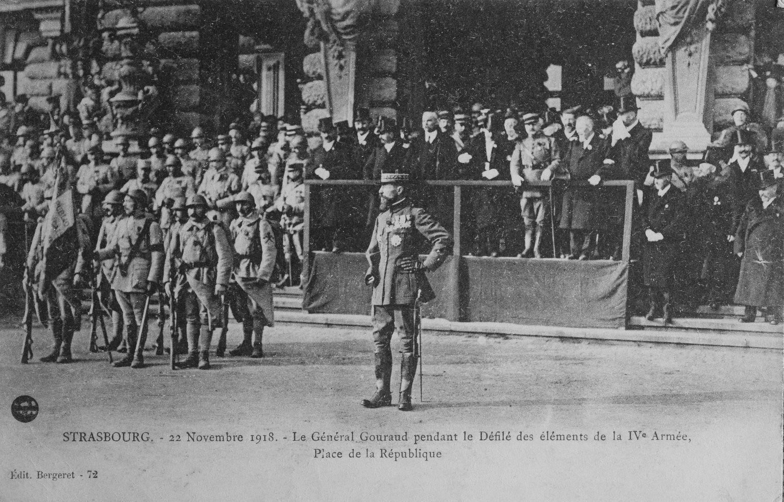 Entrée de la quatrième armée française menée par le général Gouraud à Strasbourg le 22 novembre 1918.